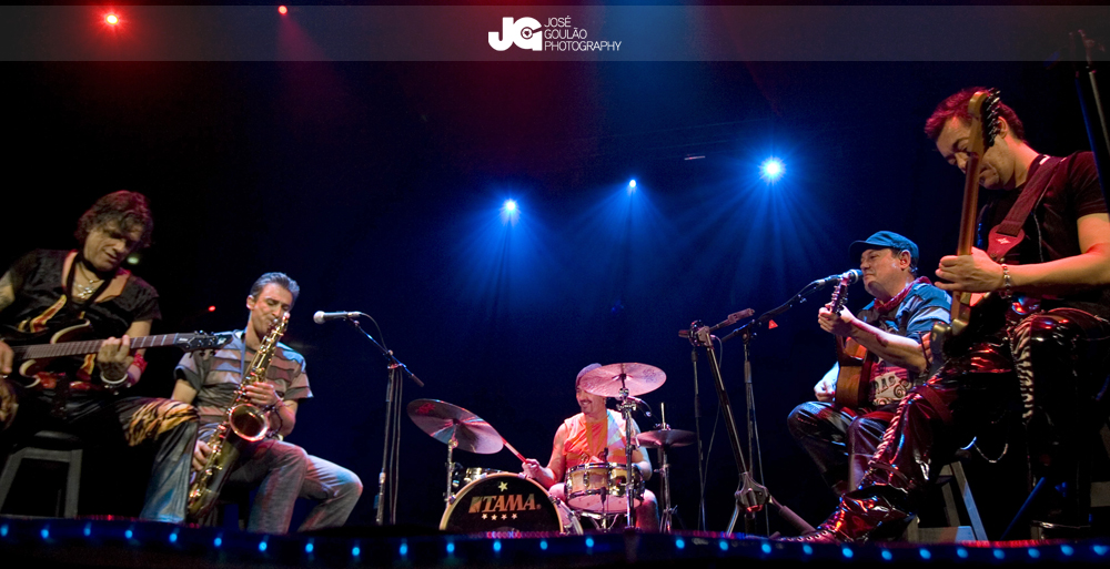 Concerto Xutos e Pontapés no Campo Pequeno 09 Dezembro 2007